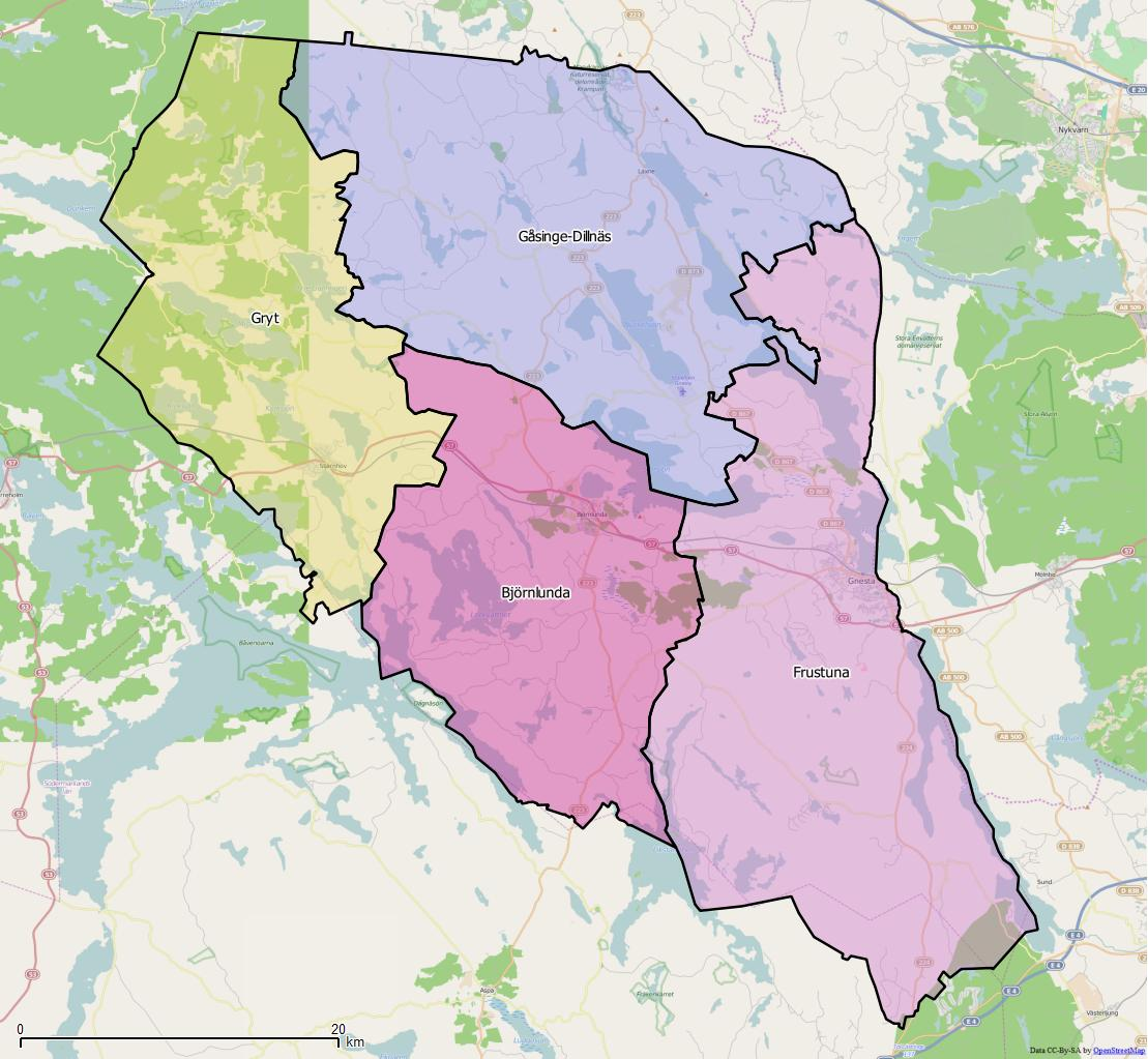 Distriktsindelningen i Gnesta kommun